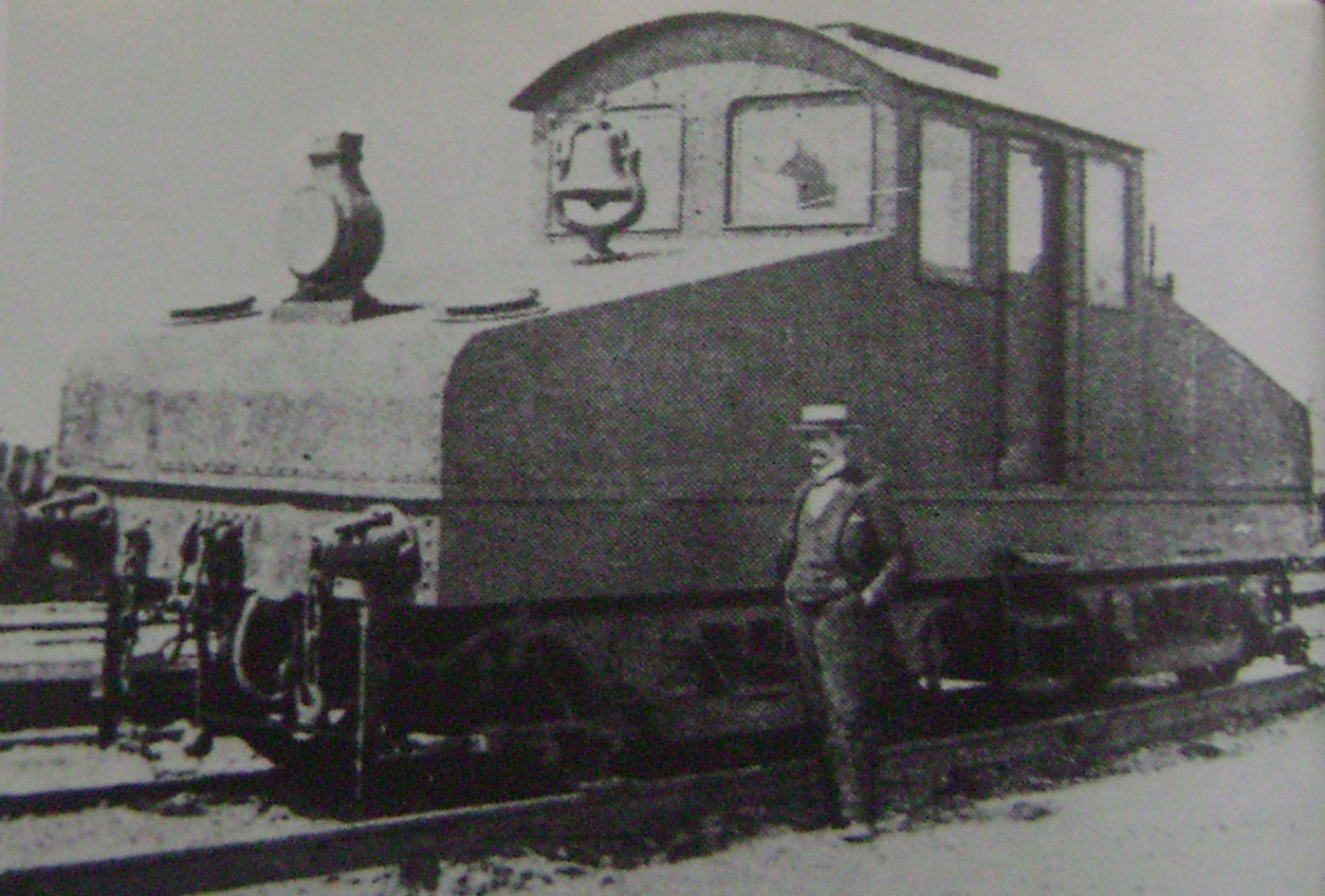 Locomotora RM01 Battistino de la Rete Mediterranea usato sulla Varesina Milano–Varese–Porto Ceresio